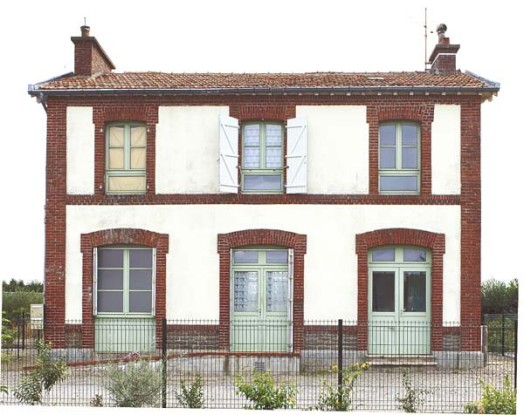 gare de cn